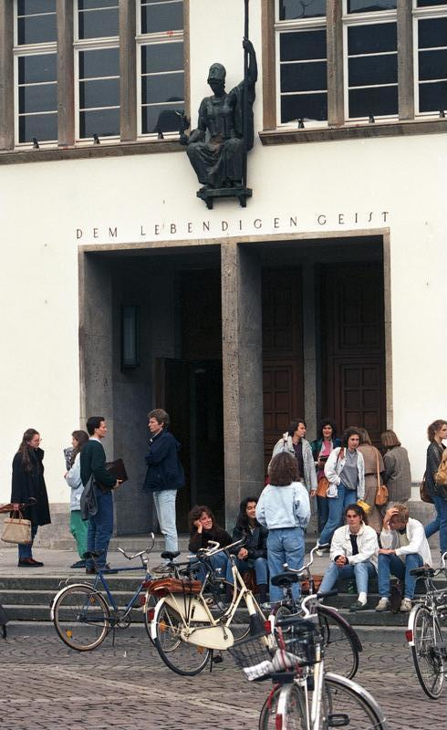 Juni 1988 Heidelberg Innenstadt Universität